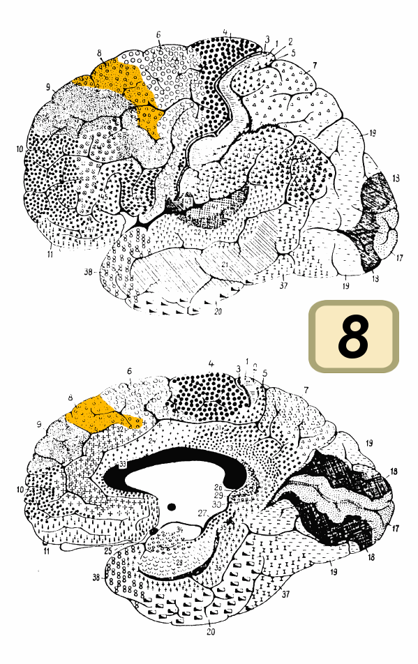 Brodmann area 8.